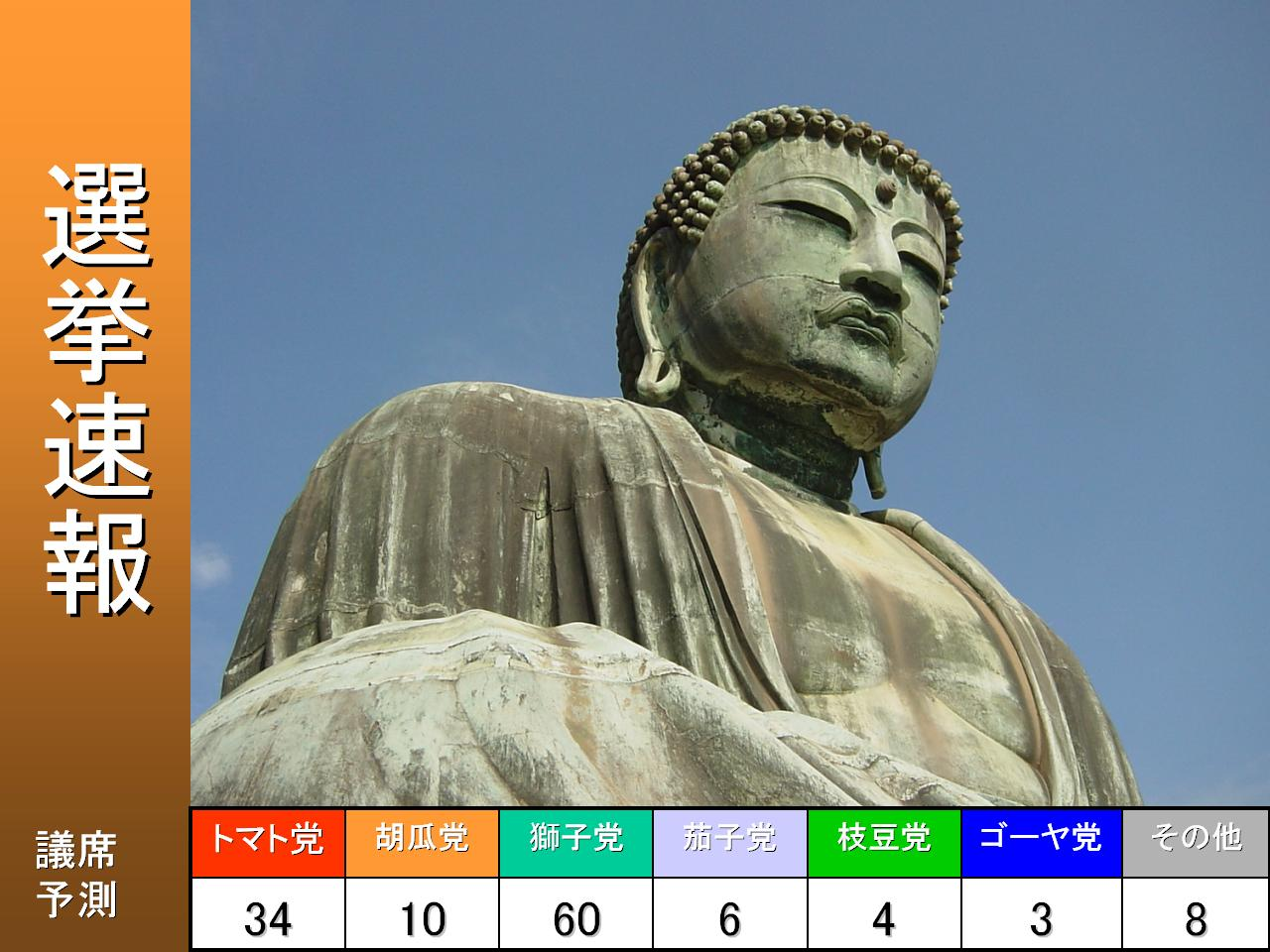 選挙速報イメージ